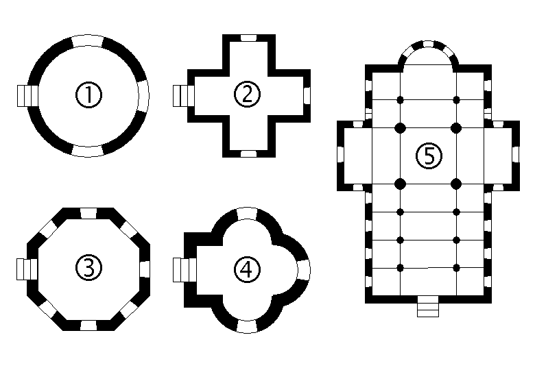 Zentral vs Laengsbau